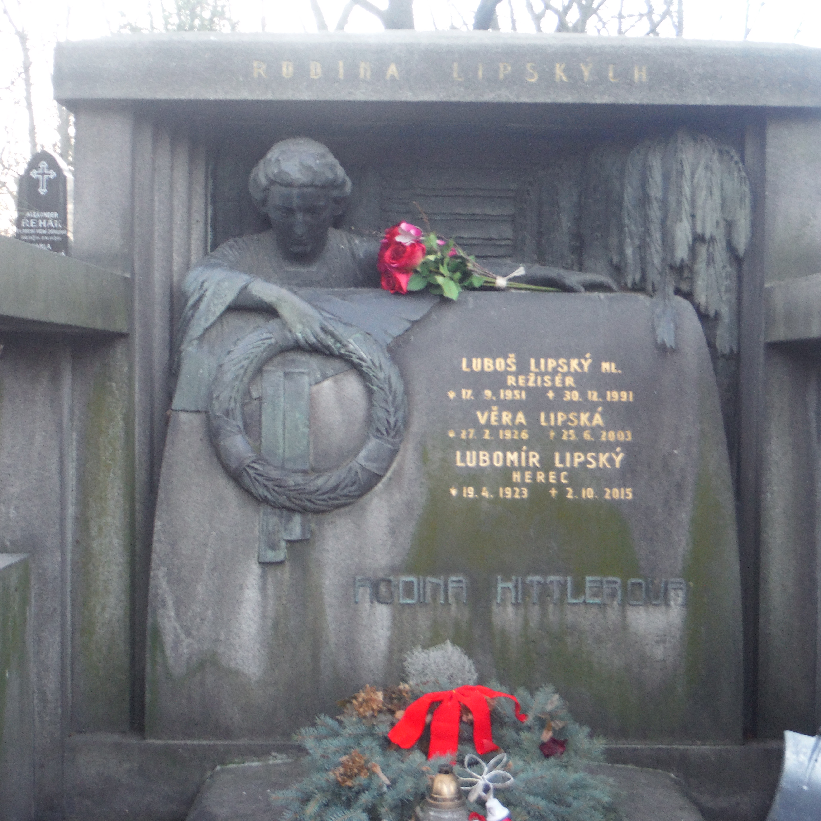 hrob